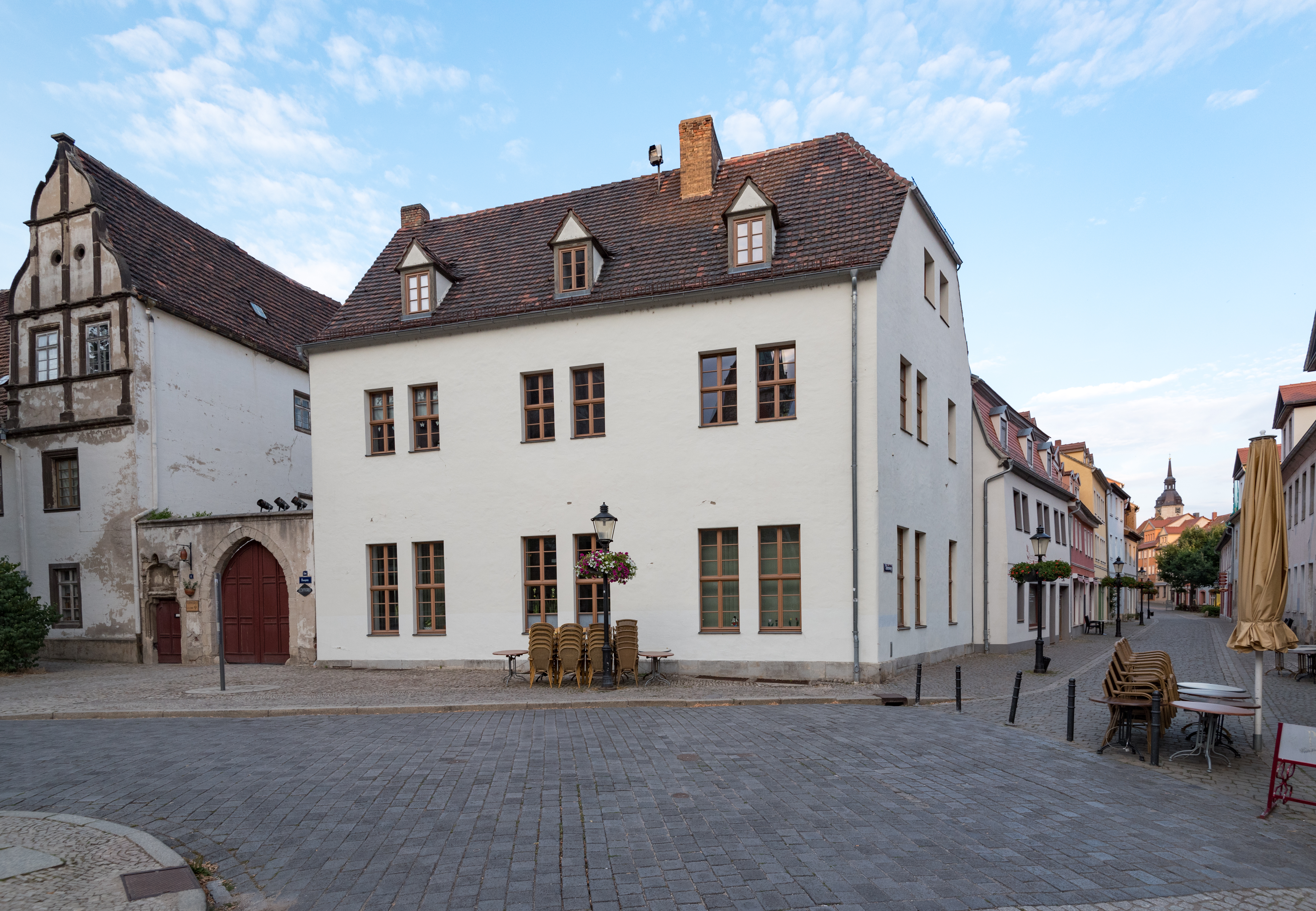 Naumburg (Saale), Domplatz 1a